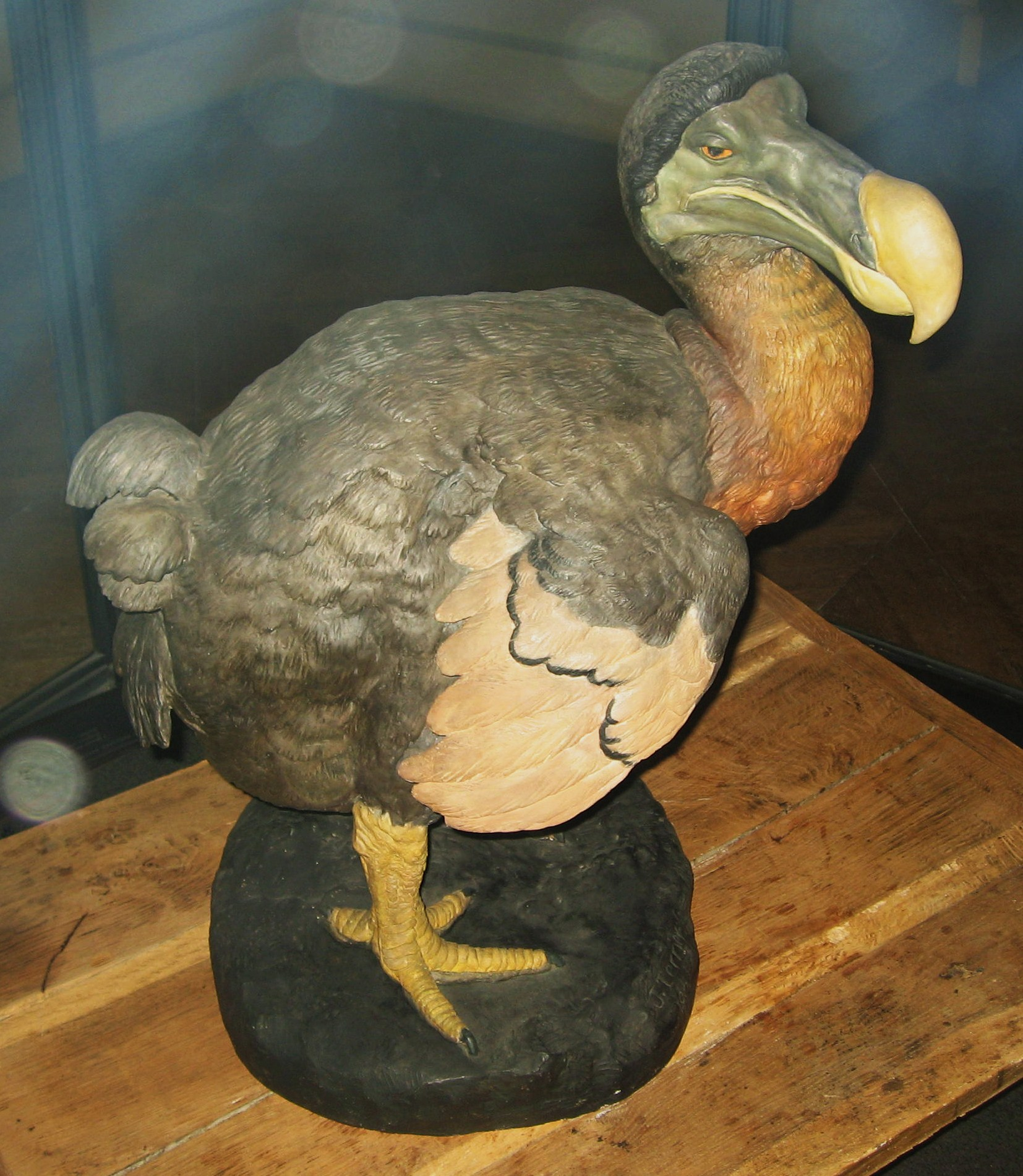 Raphus cucullatus reconstitution in Grande galerie de l'évolution-Espèces menacées ou disparues Map: 48° 50' 32" N 2° 21' 23" E